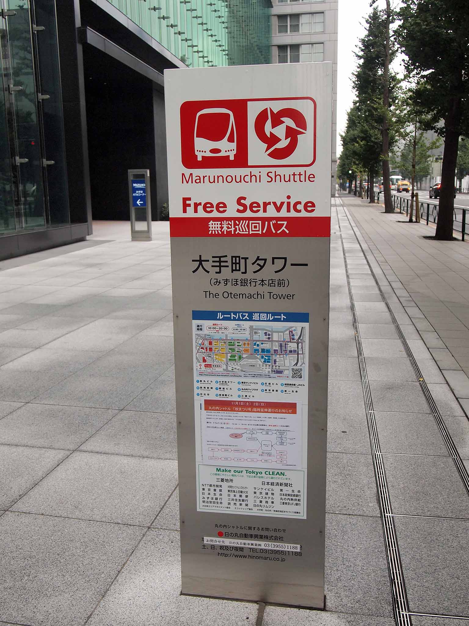 日の丸自動車興業の無料巡回バス「丸の内シャトル」のバス停標識。路線バスと異なり路上には設置できず、私有地の敷地内や外壁などに設置される。写真は大手町タワー停留所（旧・みずほ銀行停留所）。